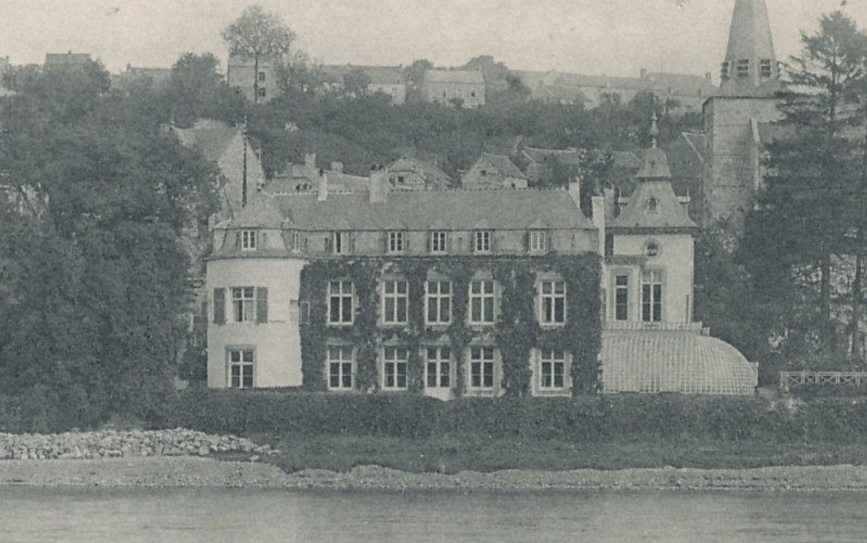 Château de Namêche